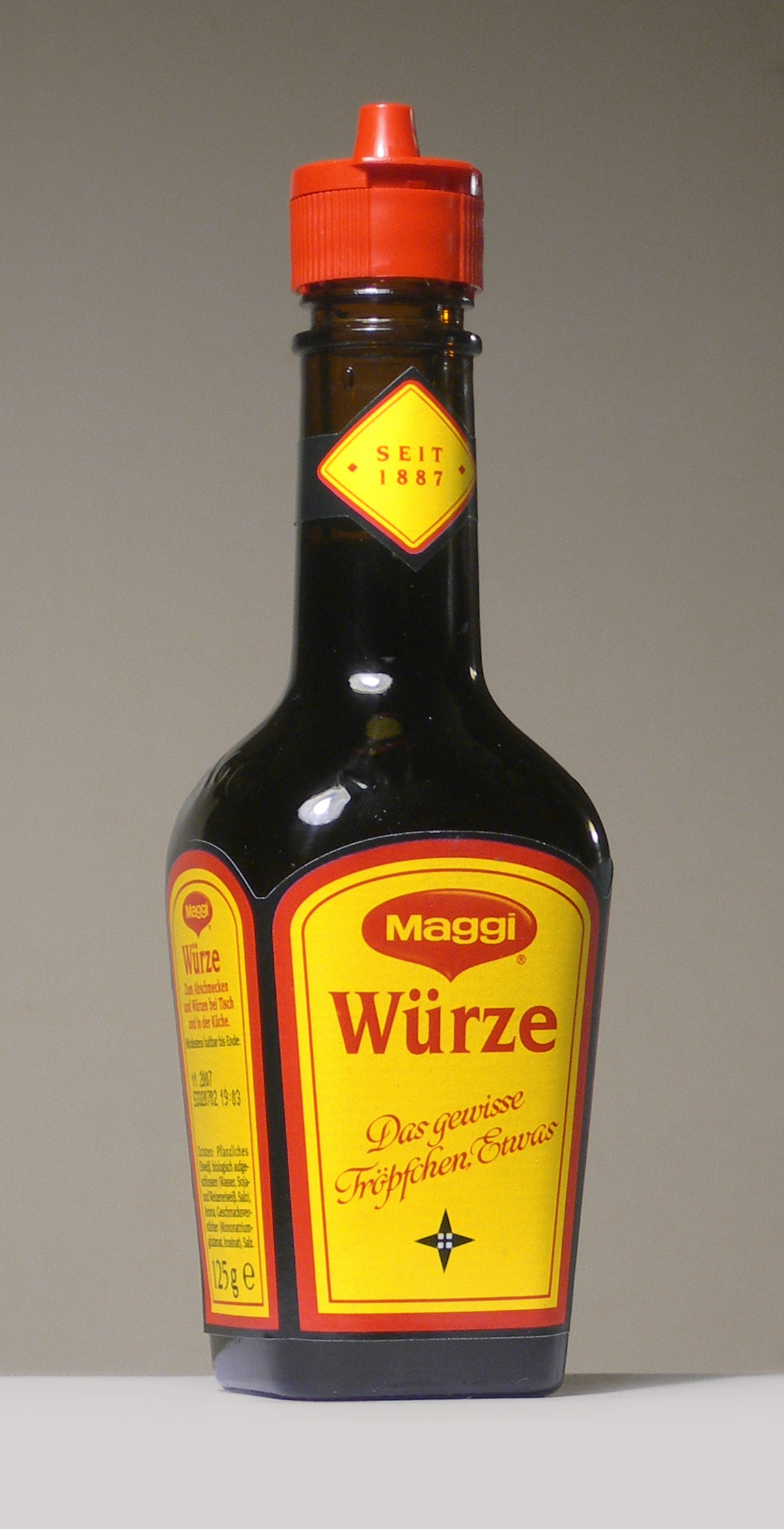 Maggi-Flasche. Neue Flasche, 2006. Inhalt 125 g.